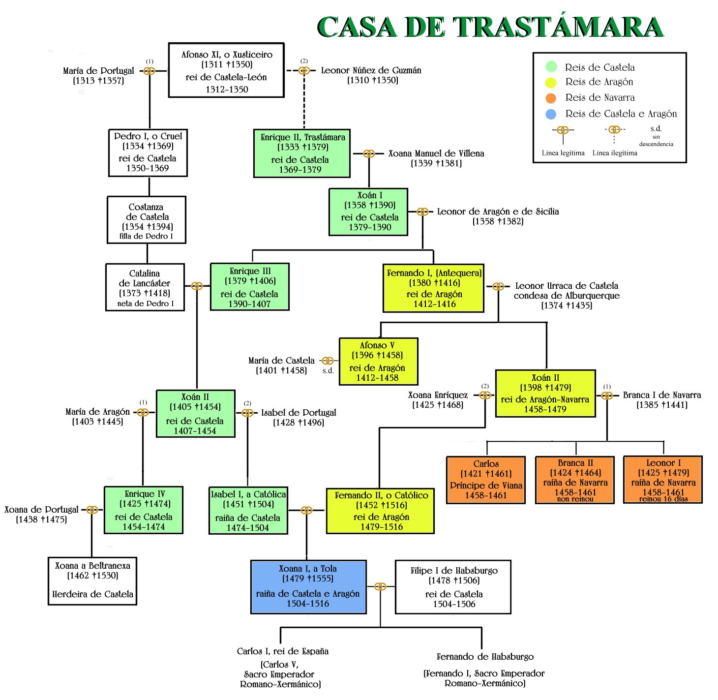 Arbre généalogique de la dynastie de la Maison de Trastámara